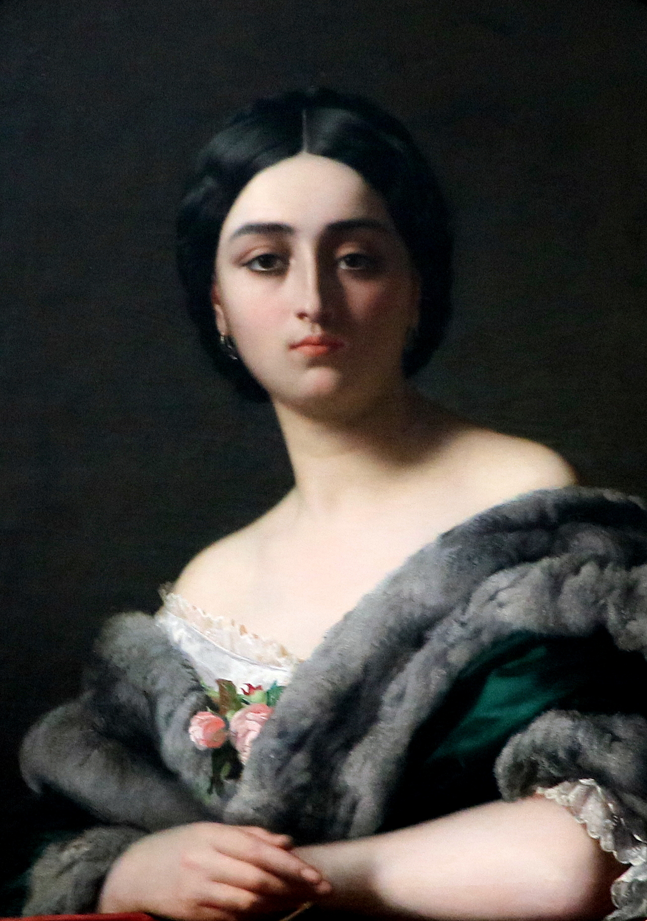 Léonide (ou Monna Belcolore) de Karl Ernest Rudolf Salem Lehmann dit Henri Lehmann (1848). Huile sur toile / Achat à l’artiste Salon de Paris, 1848 / Inv. 1065 / Musée d’arts de Nantes, France